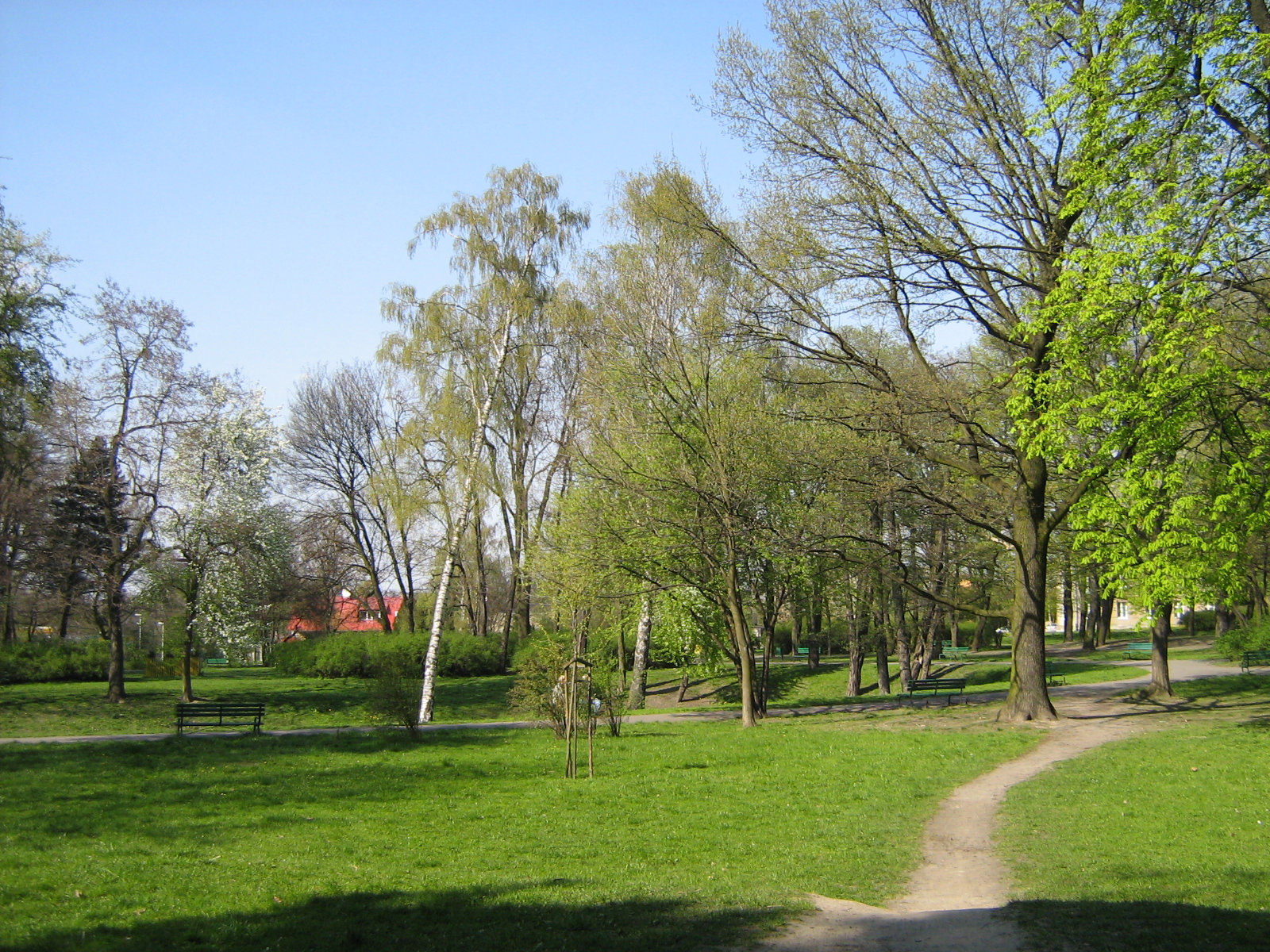 Park im. J. Słowackiego Łódź